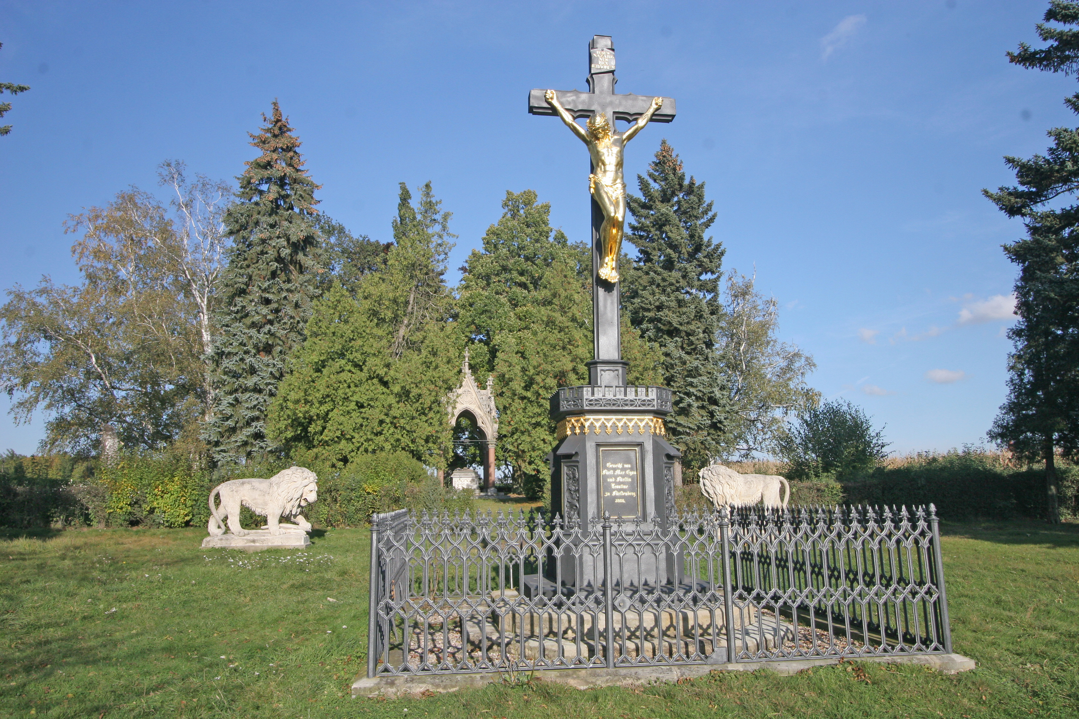 Vojenský hřbitov pruský a soubor pomníků v okolí obce (Chlum), v obci a v okolí, Chlum